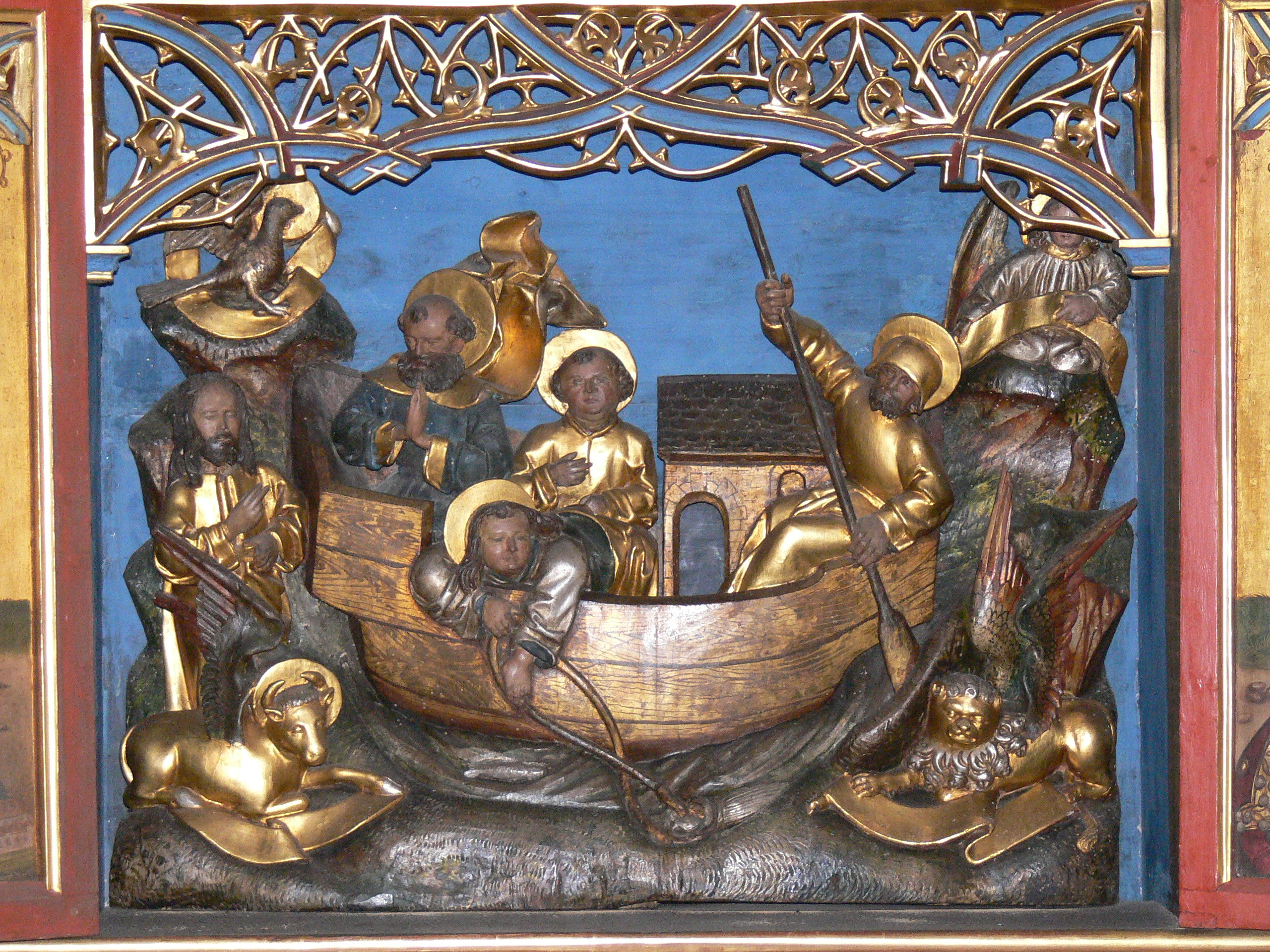 Münster in Heilsbronn. St.Peter-und-Paul-Altar ( 1510-1518 ): Fischzug Petri mit Evangelistensymbolen in der Predella